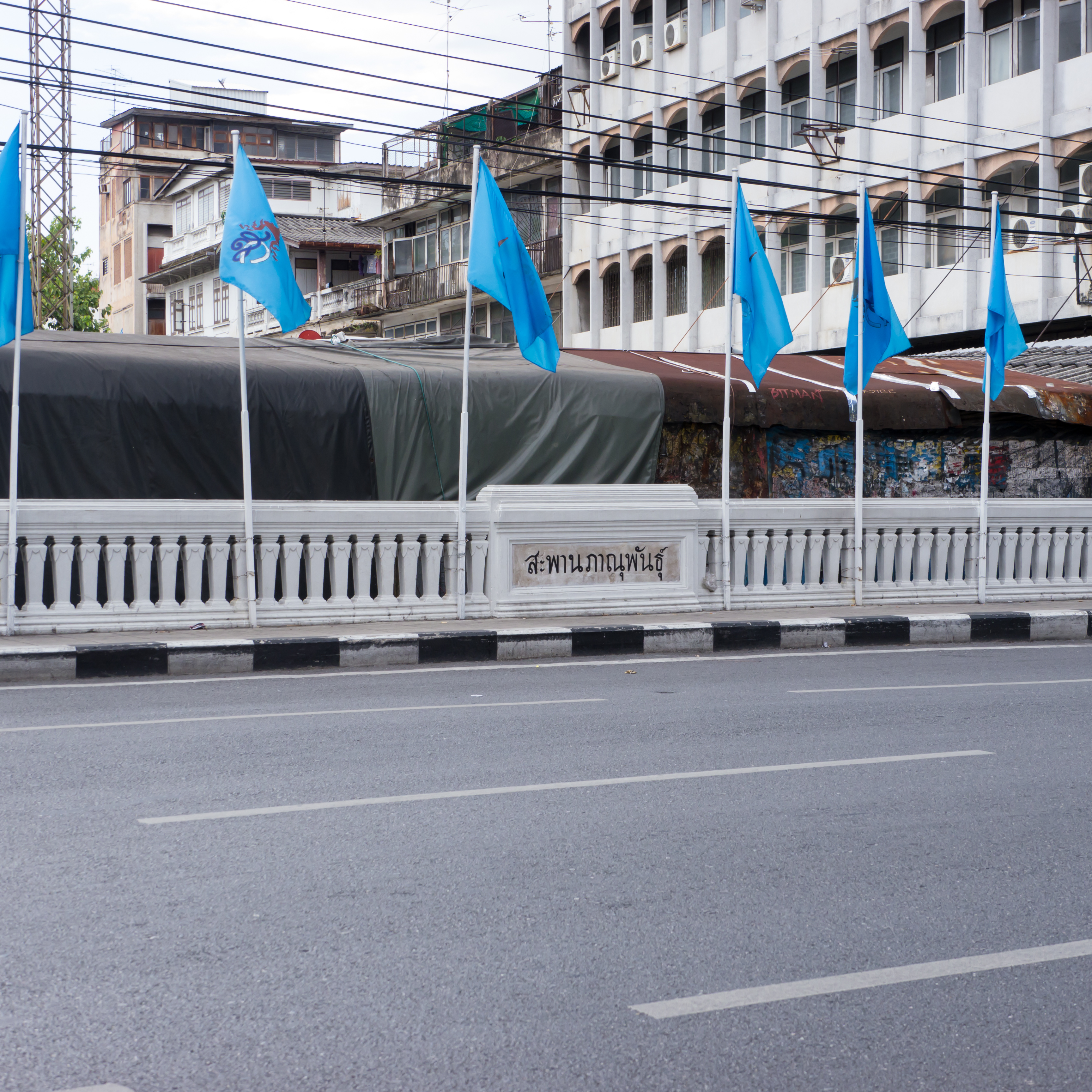 สะพานภาณุพันธุ์